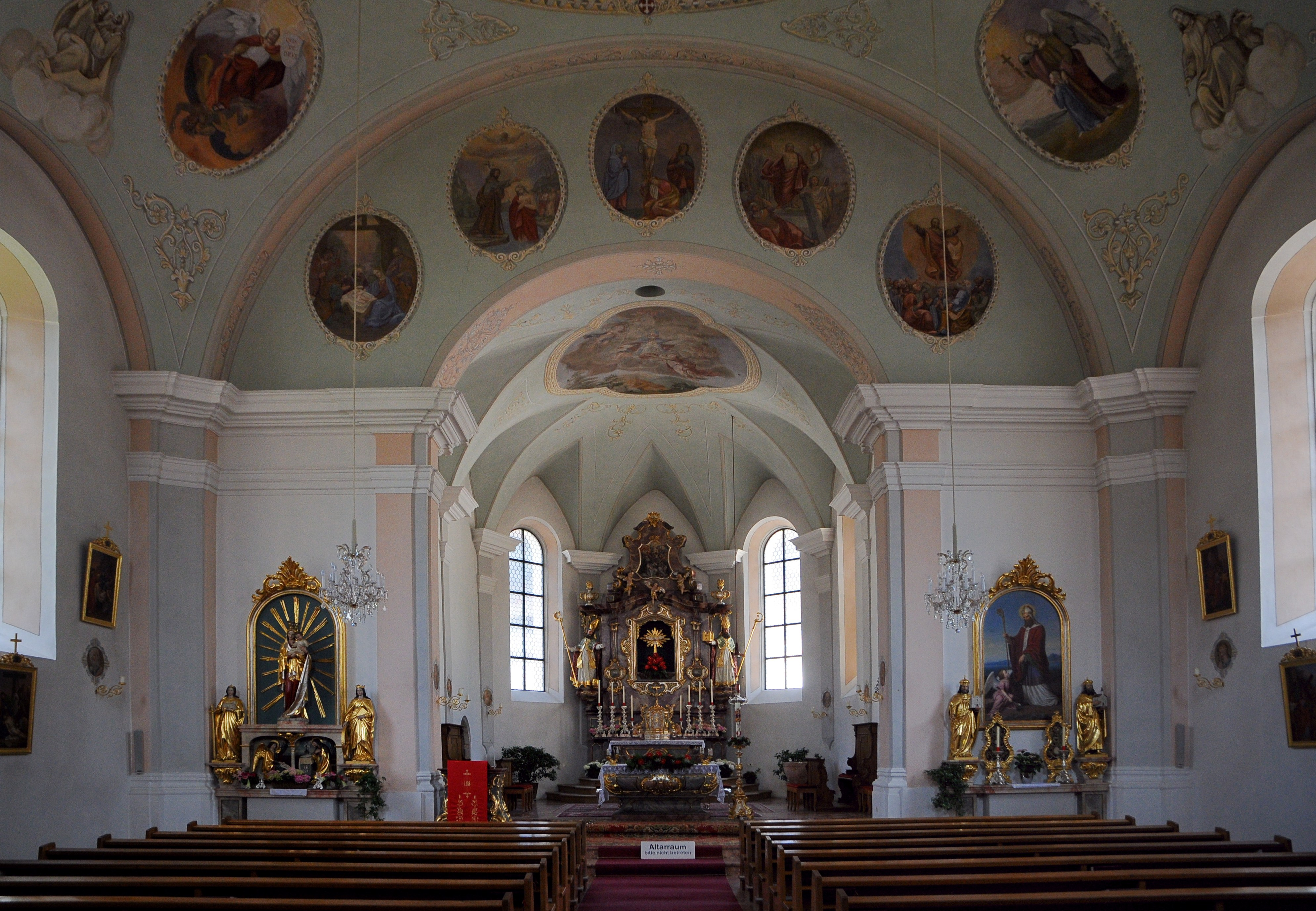 Die Pfarrkirche hl. Nikolaus der Gemeinde Westendorf (Tirol).